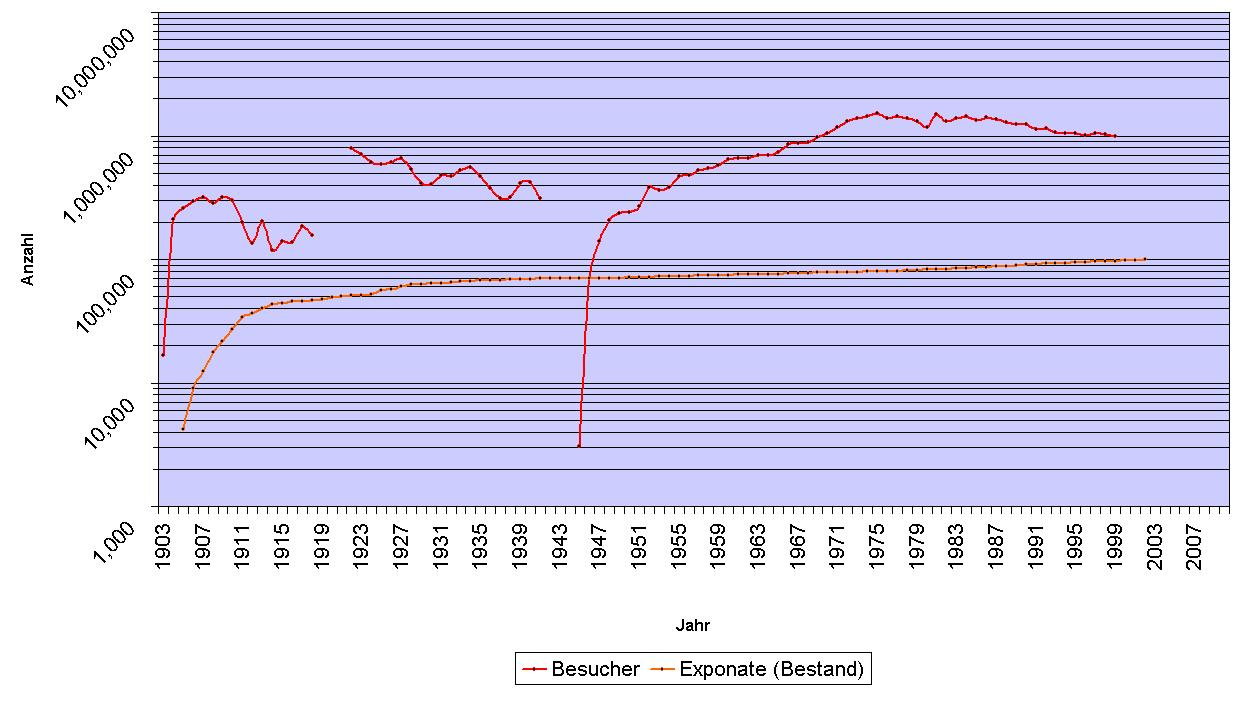 Besucher- und Exponatstatistik des Deutschen Museums von 1905 bis 2002 (logarithmische Darstellung, erzeugt mit Excel)